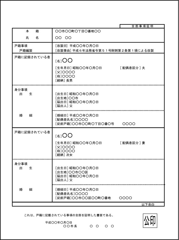 koseki(family register) / 戸籍事項証明書